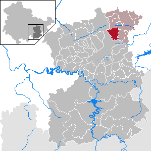 Schmieritz in Thuringia - Saale-Orla-Kreis